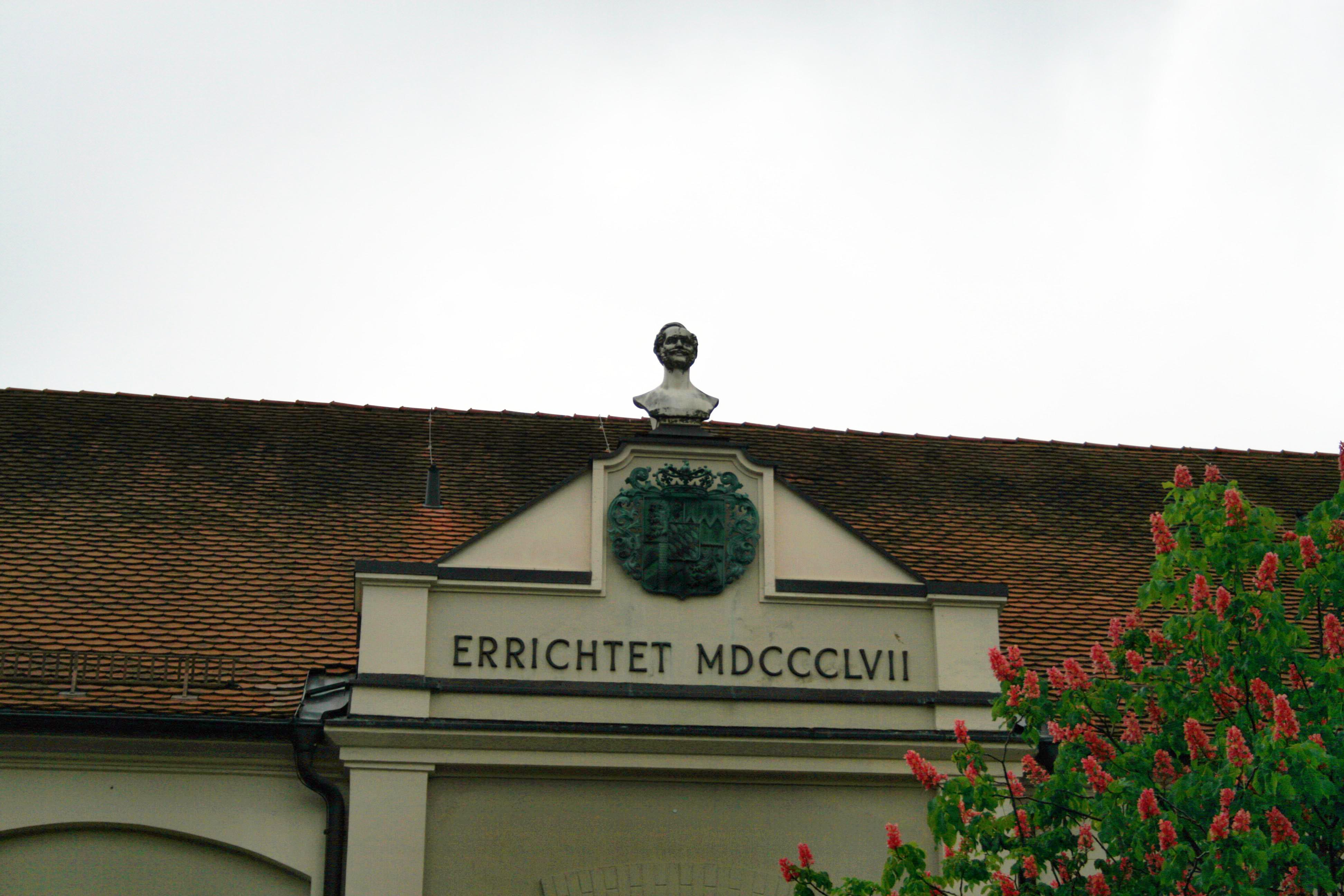 Büste König Maximilians II. am Landgericht